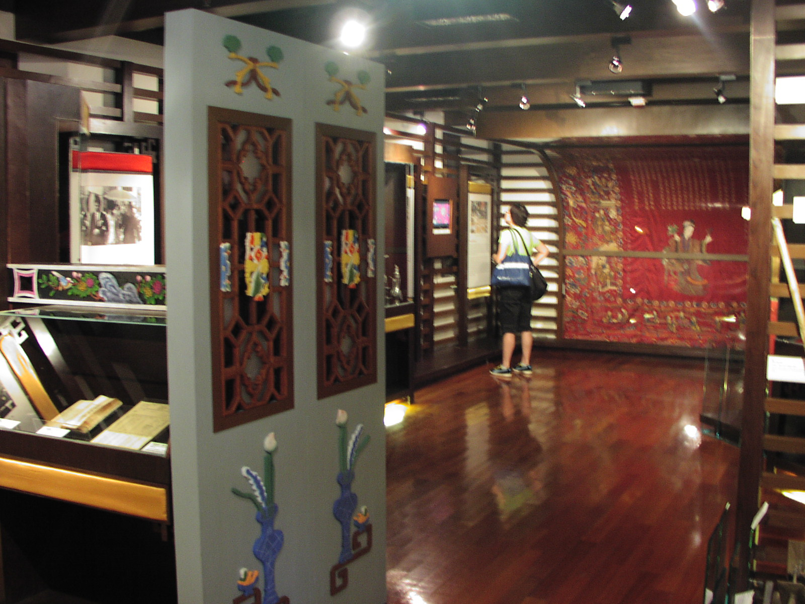 Ping Shan Tang Clan Gallery